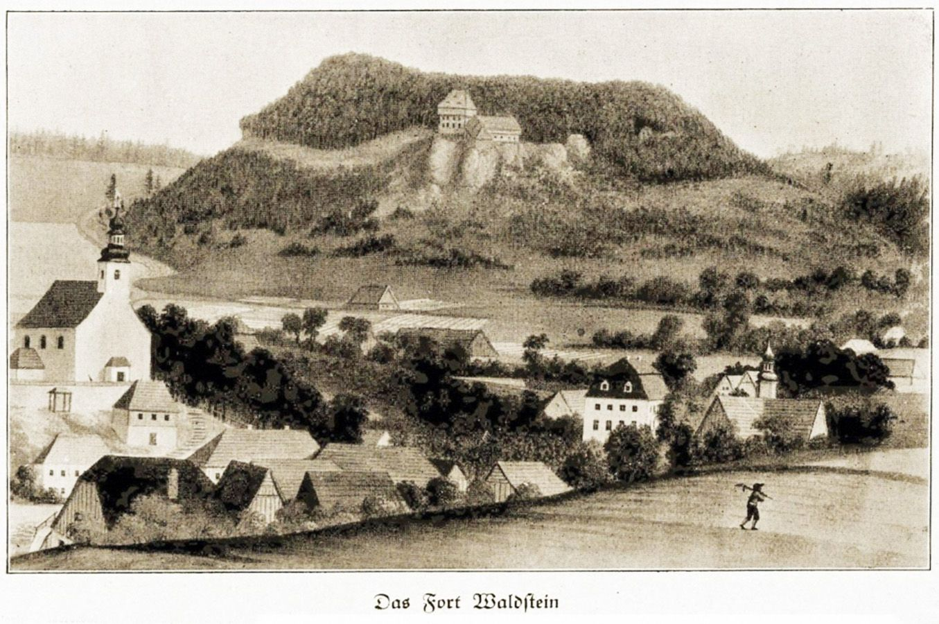 Fort Waldstein, der Vorgängerbau von Burg Waldstein bei Rückers in Schlesien in einer zeitgenössischen Darstellung